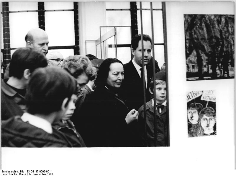 Zentralbild Franke 17.11.1968 Berlin: Zentrale "Galerie der Freundschaft" eröffnet Ehrengast bei der feierlichen Eröffnung der zentralen "Galerie der Freundschaft" am 17.11.68 in Berlin war Prof. Lea Grundig, Mitglied des ZK der SED und Präsidentin des Verbandes Bildender Künstler Deutschlands. Prof. Grundig übernahm den Ehrenvorsitz der zentralen Galerie, die bis Anfang Januar 1969 im Märkischen Museum zu sehen ist. Die Ausstellung zeigt 482 künstlerische Arbeiten von Kindern und Jugendlichen im Alter von 6 bis 18 Jahren. Es waren 535.000 Arbeiten aus den Schulen aller DDR-Bezirke eingesand worden.